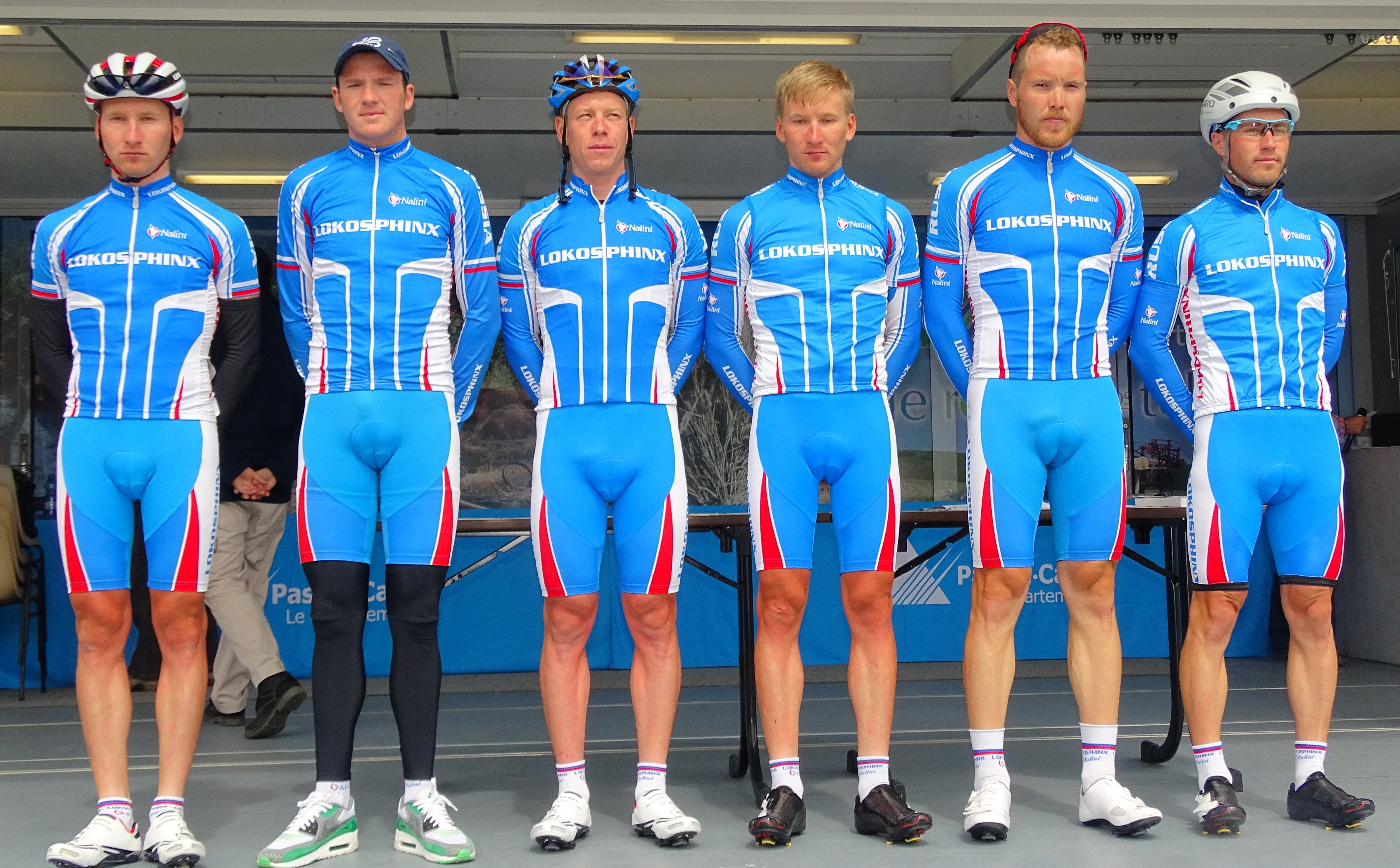 Reportage réalisé le samedi 23 mai 2015 à l'occasion du départ de la deuxième étape du Paris-Arras Tour 2015 à Ficheux, Pas-de-Calais, Nord-Pas-de-Calais, France. Depicted team: Lokosphinx